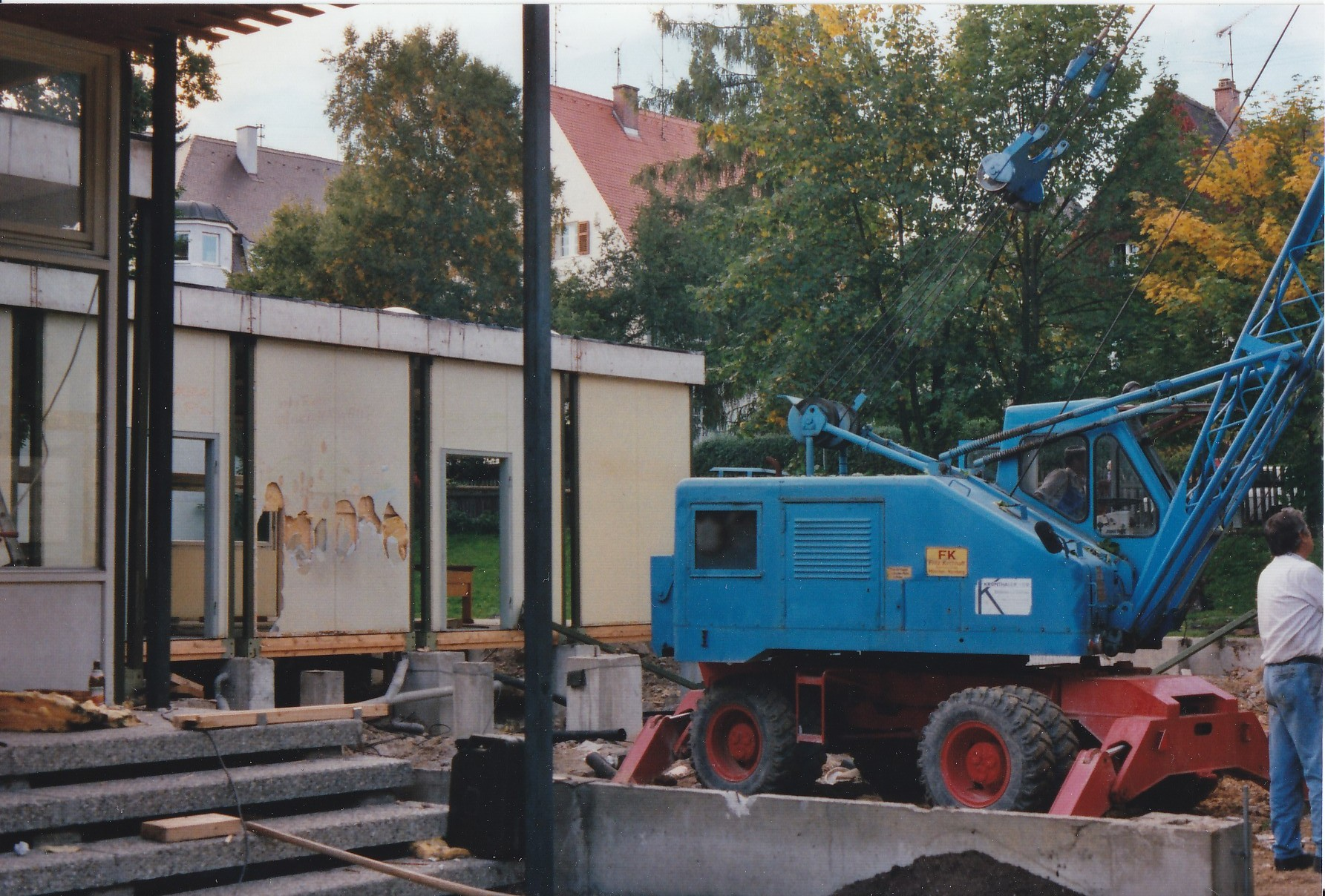 Wegen Raumnot wurden Container-Klassenzimmer neben dem alten Hauptgebäude in der Haydstrasse aufgebaut.